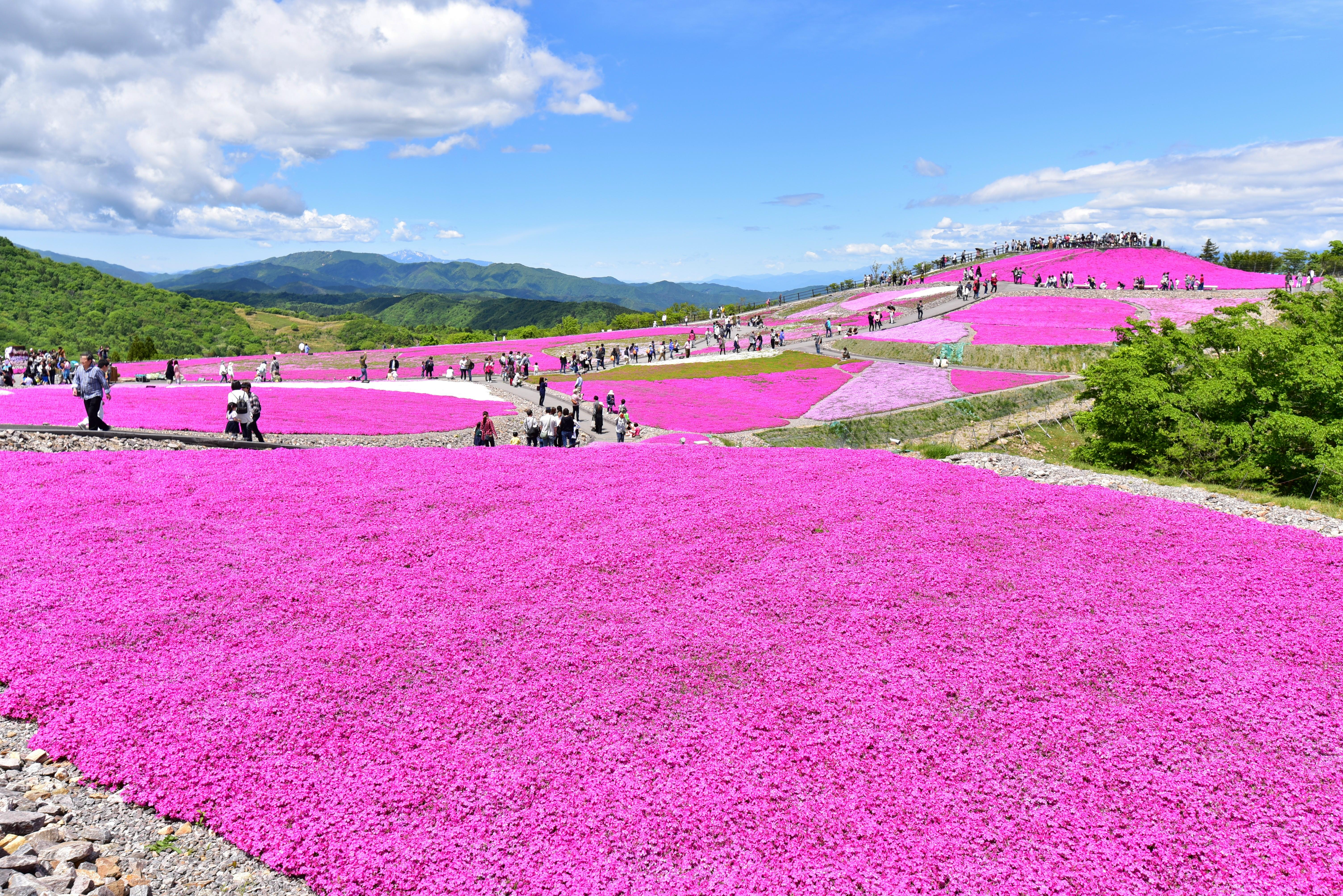 茶臼山高原の芝桜 Nikon D750